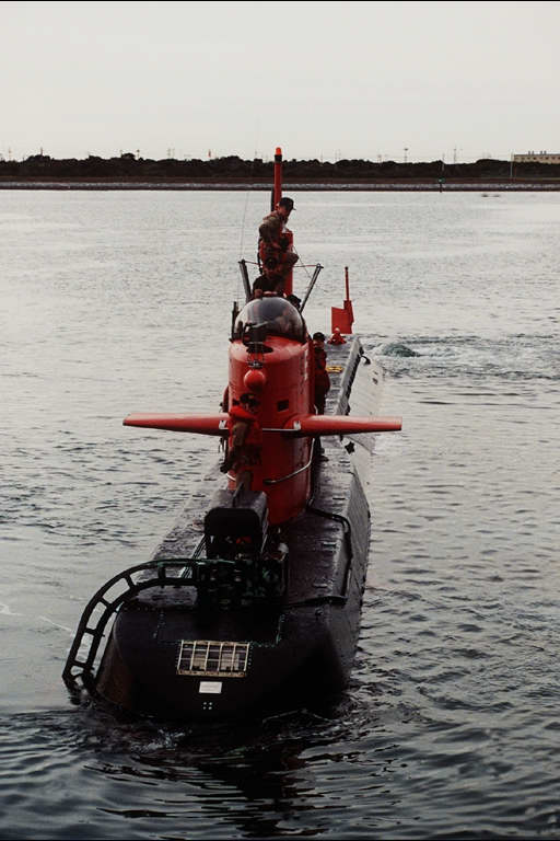 NR-1 thumb